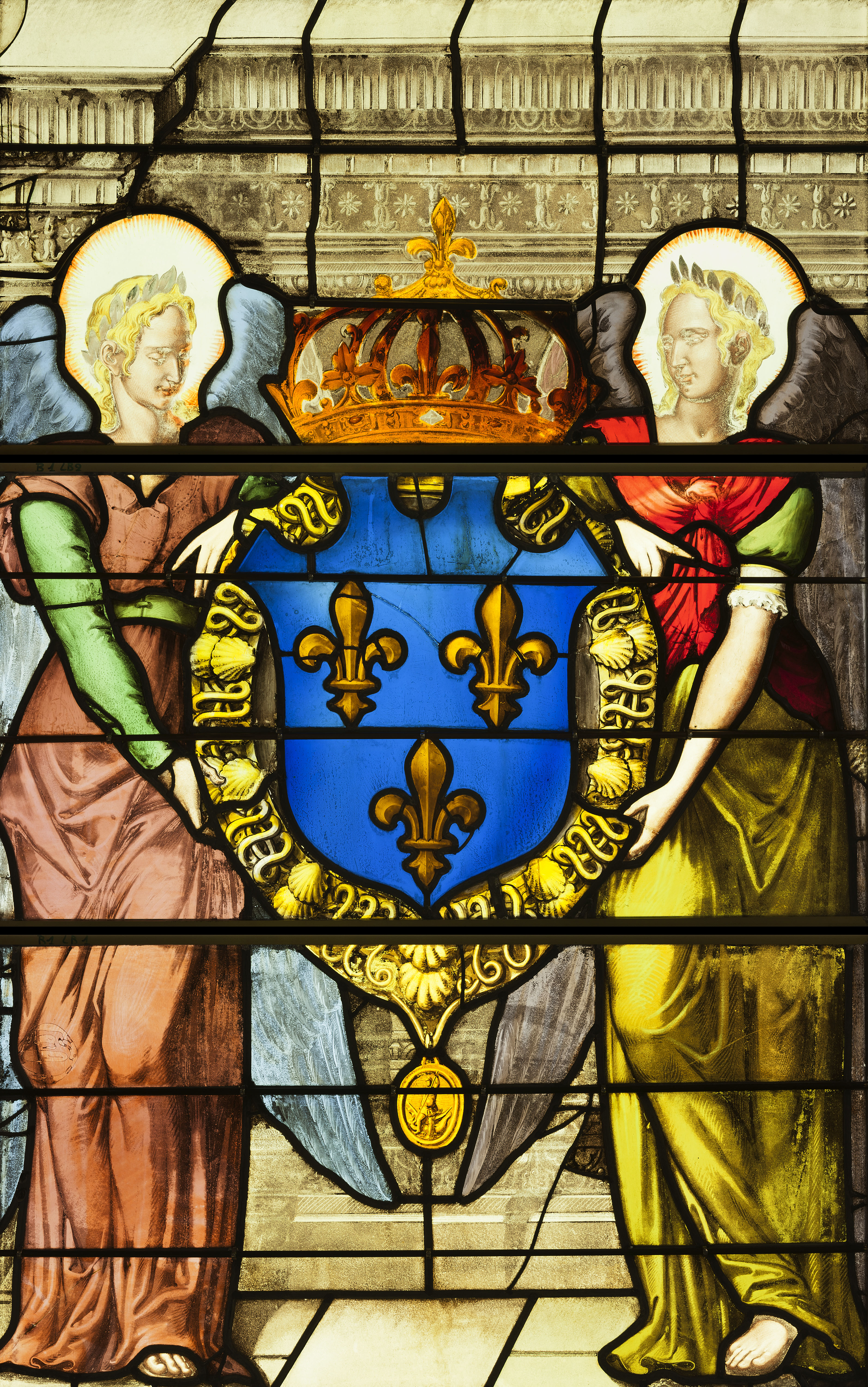 Montage présentant la partie gauche du soubassement de la baie 1 de l'abside.